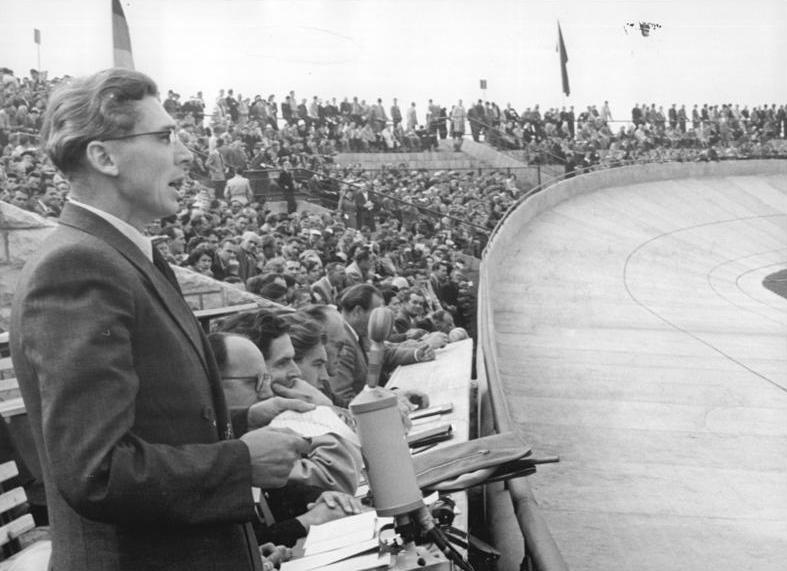 Berlin, Radrennbahn, Eröffnungsfeier, H. Fechner Zentralbild Funck 25.9.1955 Ro-Eg. Radrennbahn Weissensee der Öffentlichkeit übergeben Der Stellvertreter des Oberbürgermeisters, Herbert Fechner übergab am 25.9.1955 den Radsportlern Berlins die Radrennbahn Weissensee. Mehr als 6000 Aufbauhelfer haben mitgeholfen in knapp 12 Monaten diese Sportlerstätte zu schaffen. Mit der DDR-Bestenermittlung der Jugend im Zweier-Mannschaftsfahren über eine Stunde begann das sportliche Leben auf der neuen Bahn. UBz:Das erste Rennen auf der neuen Bahn. UBz:Der Stellvertreter des Oberbürgermeisters, Herbert Fechner während seiner Eröffnungsrede.